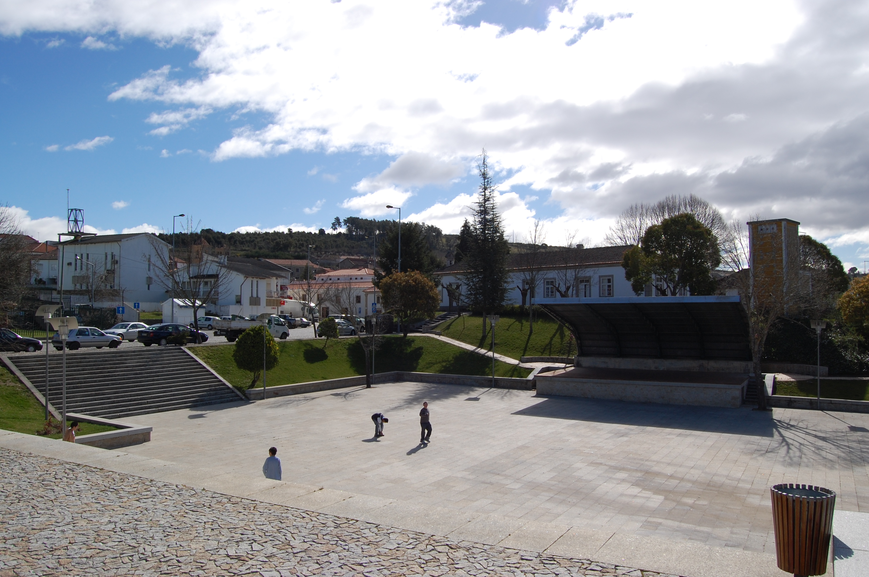 Vimioso.